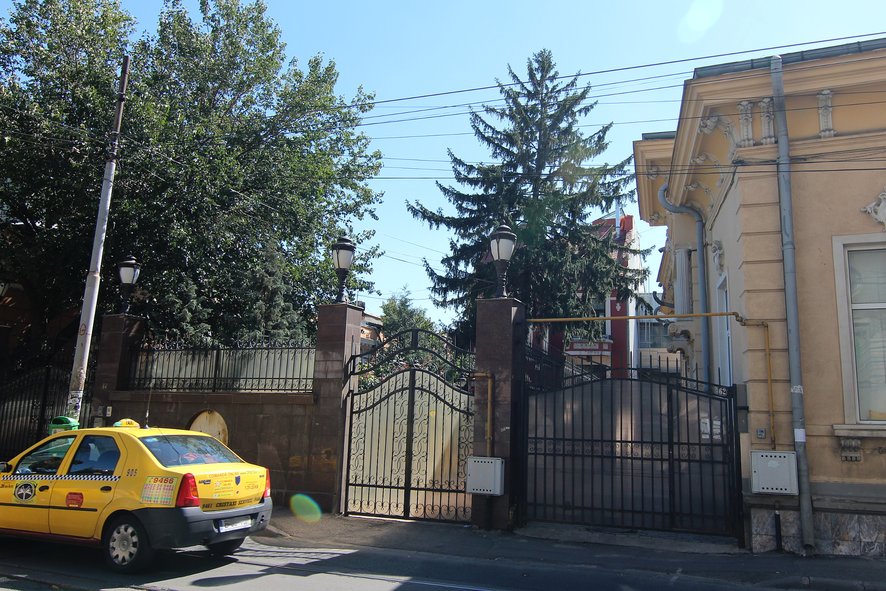 Casă pe Calea Călărașilor